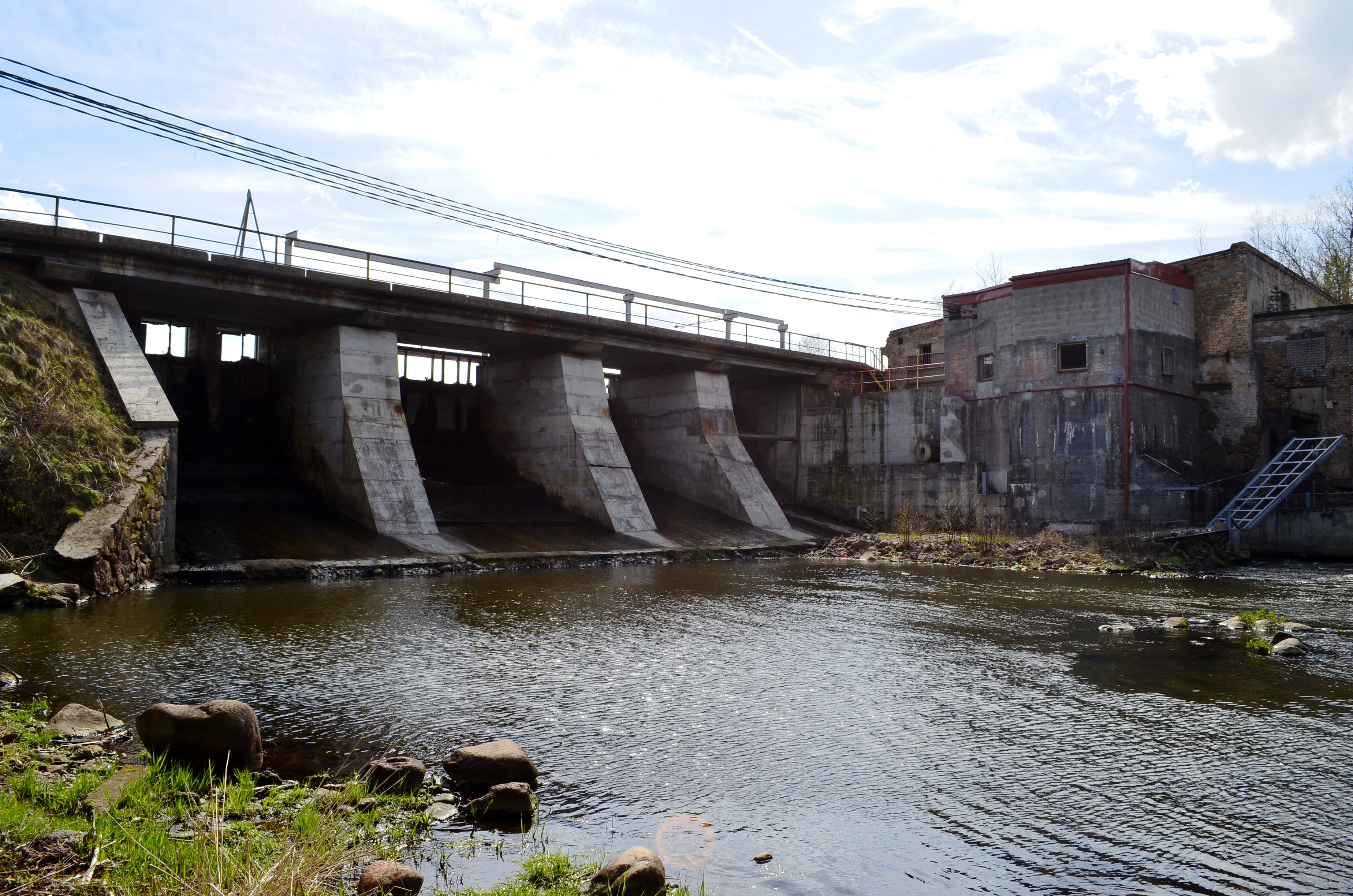 Mūrinės Vokės užtvanka, Vilnius